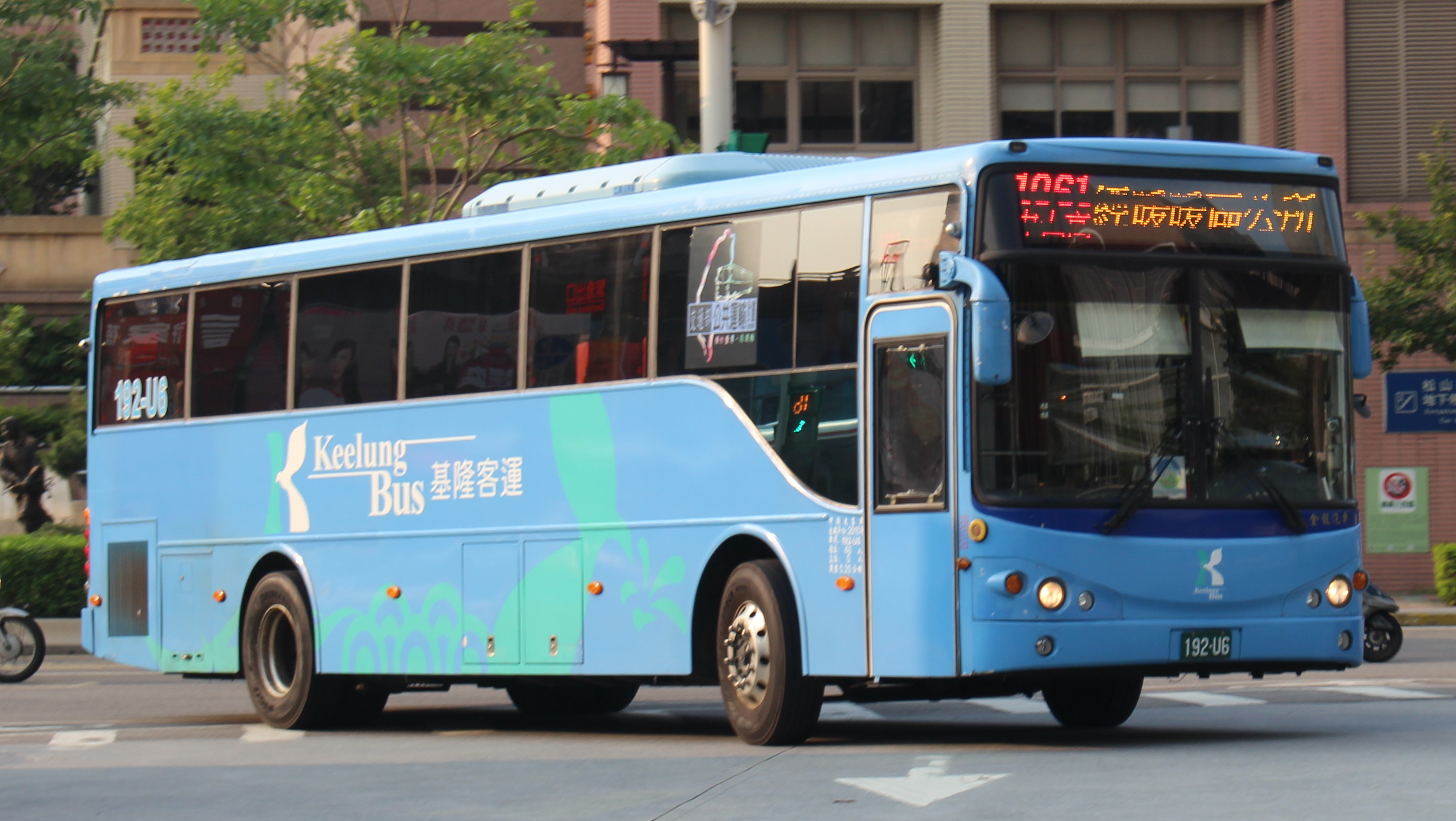 基隆客運192-U6 1061